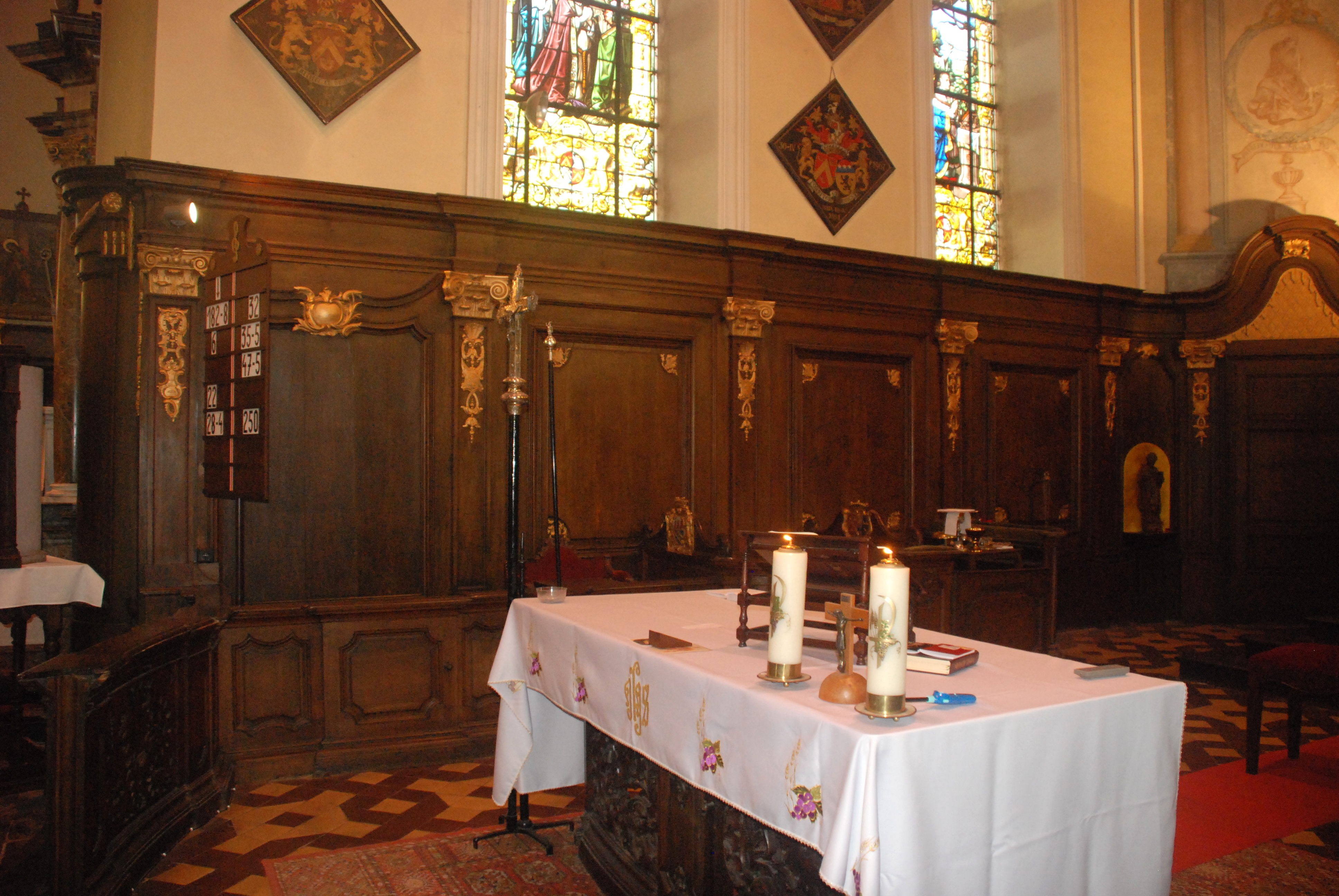 Belgique - Brabant wallon - Église Saint-Martin de Ways